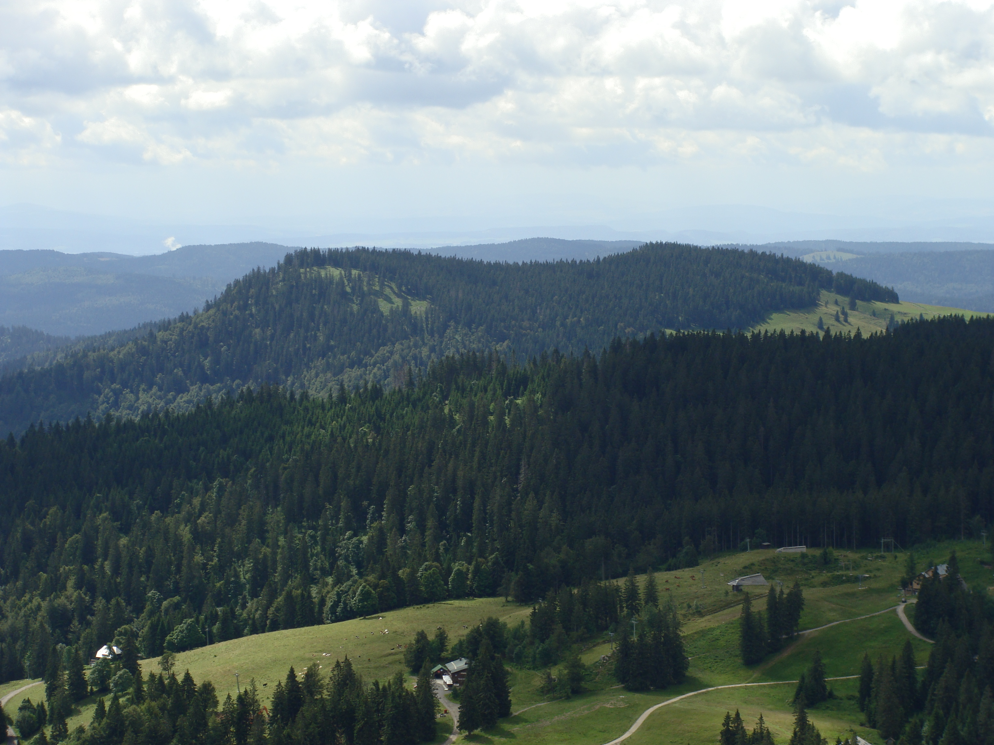 Spießhorn (1349 m) im Schwarzwald - Blick von Feldbergturm (Seebuck)